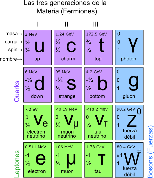 Cuadro explicativo de las partículas y sus características